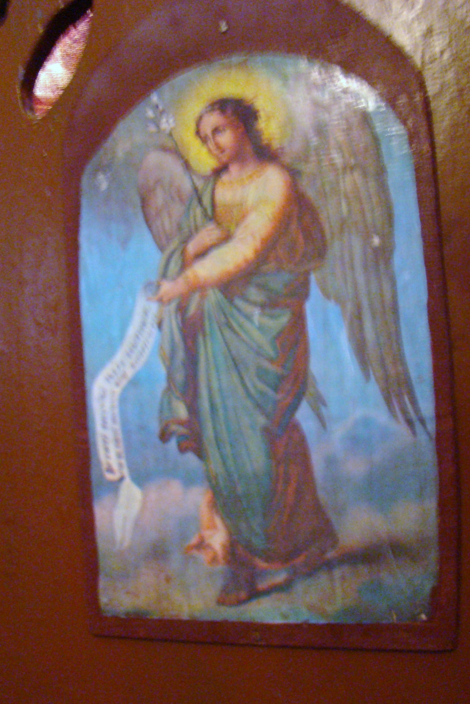 Biserica de lemn din Ciurila, județul Cluj